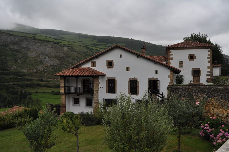 Fachada Sur de la Casona de Tudanca